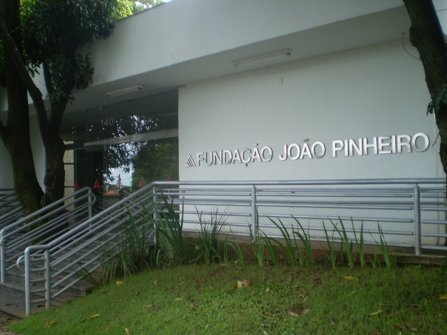 Edifício da Fundação João Pinheiro no bairro São Luiz, Belo Horizonte, MG, Brasil